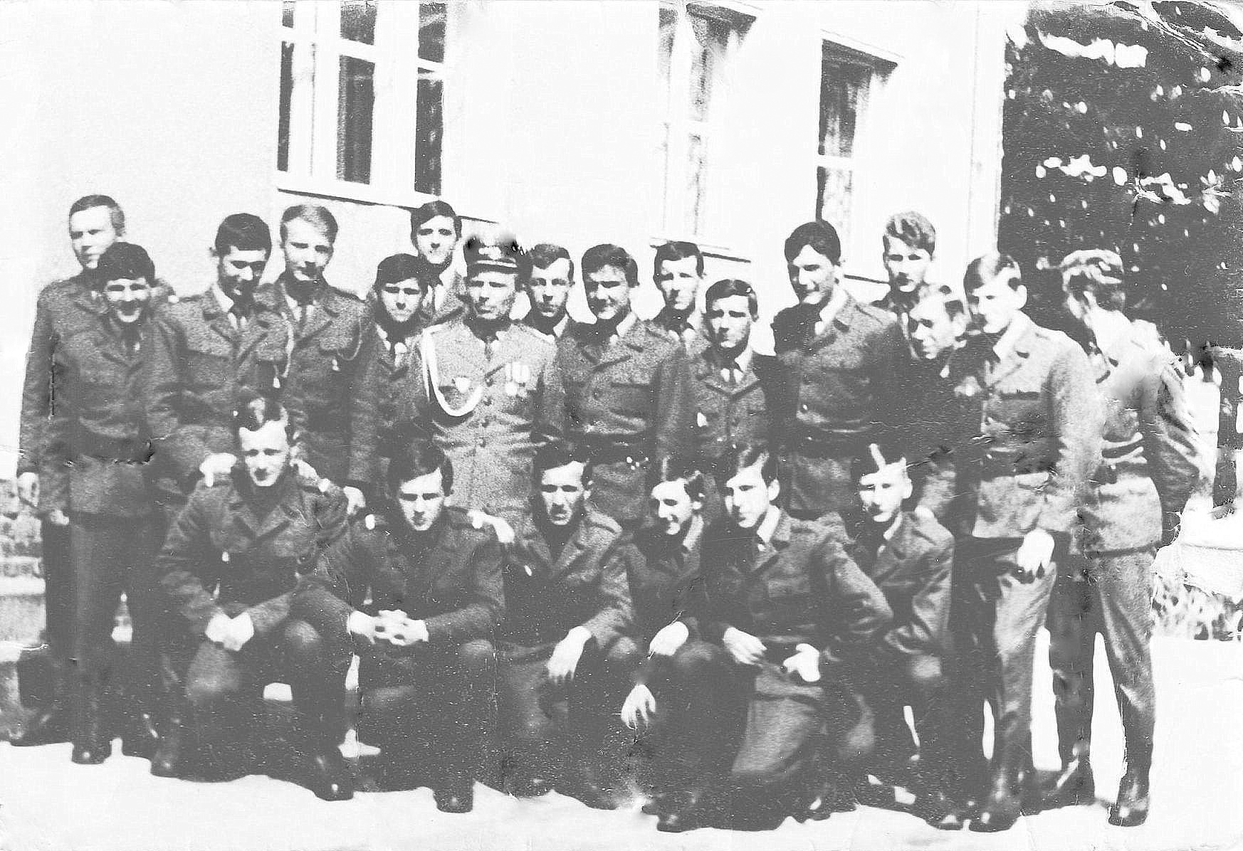 Żołnierze WOP i d-ca strażnicy kpt. Jan Dąbrowski – Strażnica Wojsk Ochrony Pogranicza Dziwnów